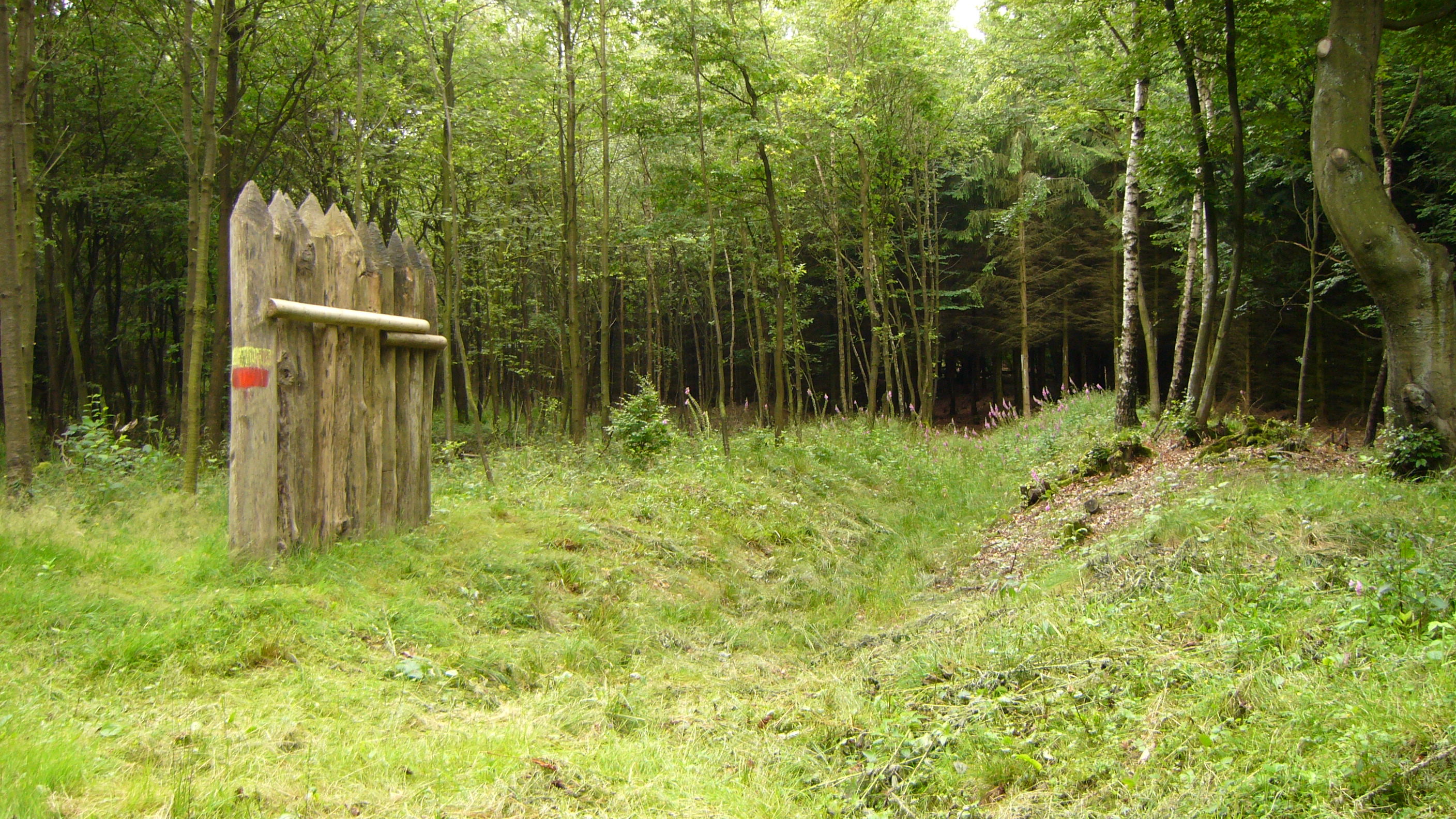 Limes im Wald bei Rheinbrohl